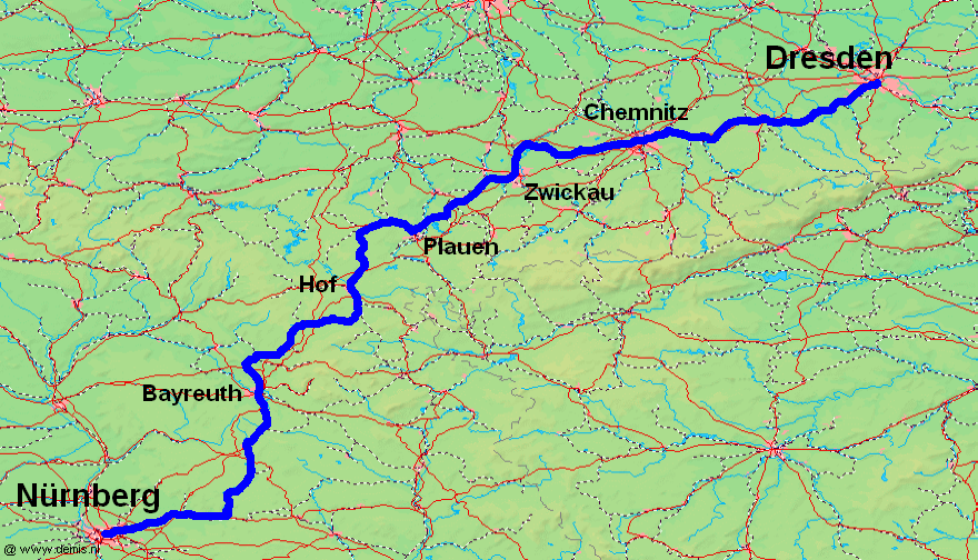 Karte der Sachsen-Franken-Magistrale.